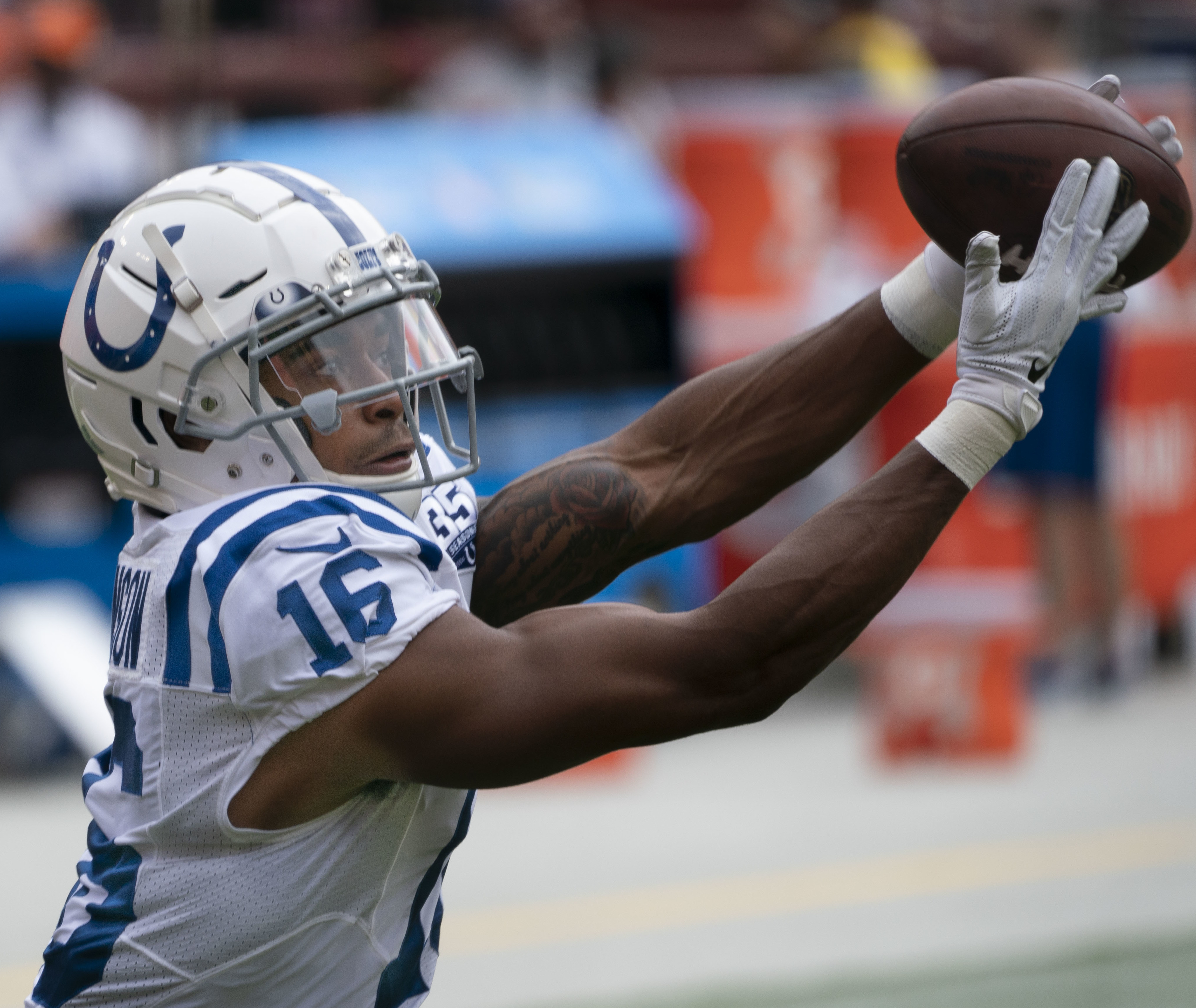 Colts at Redskins 09/16/18